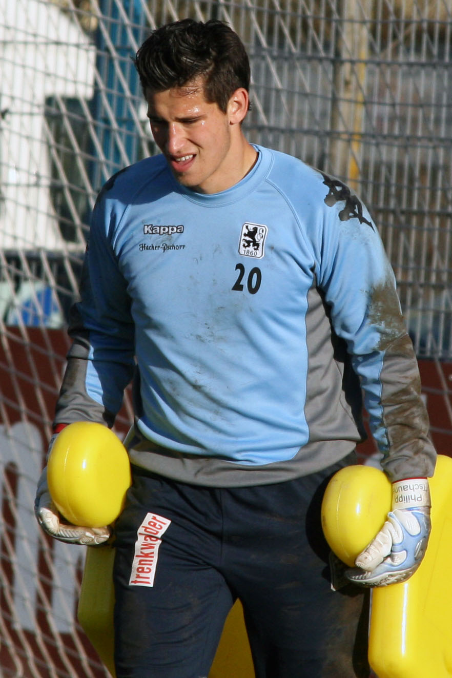 Philipp Tschauner, player of TSV 1860 München, training, 20.01.2007, Grünwalder Str., Munich